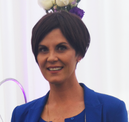 Volpato en Sesión de fotos para 'Pituca Sin Lucas'